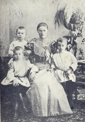 Максім Багдановіч (сядзіць злева) з цёткай і братамі. [1897 г.].